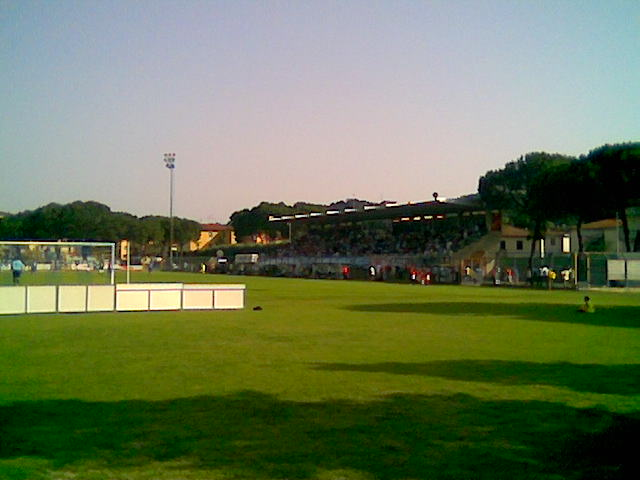 Foto dello Stadio "Goffredo del Buffa" di Figline Valdarno